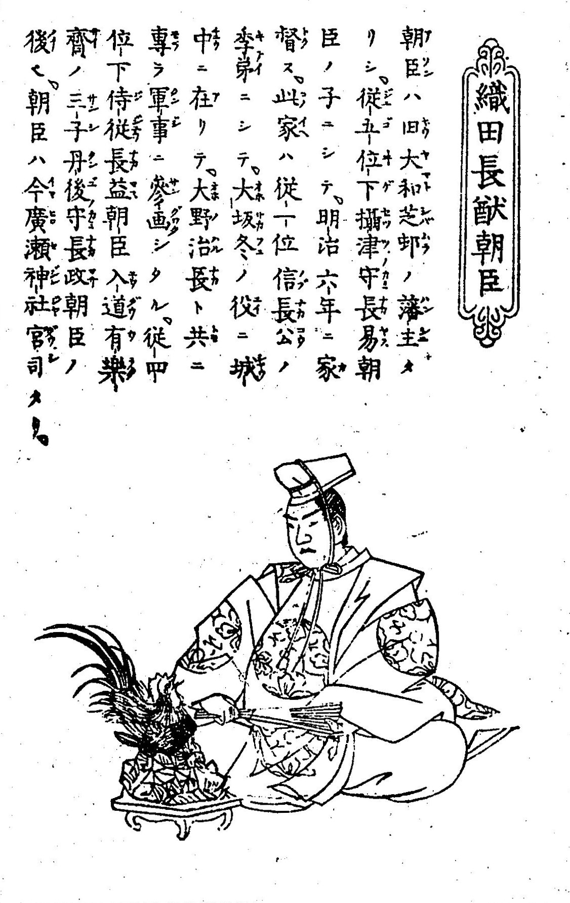 大和芝村藩主織田長易の長男・織田長猷の肖像画。